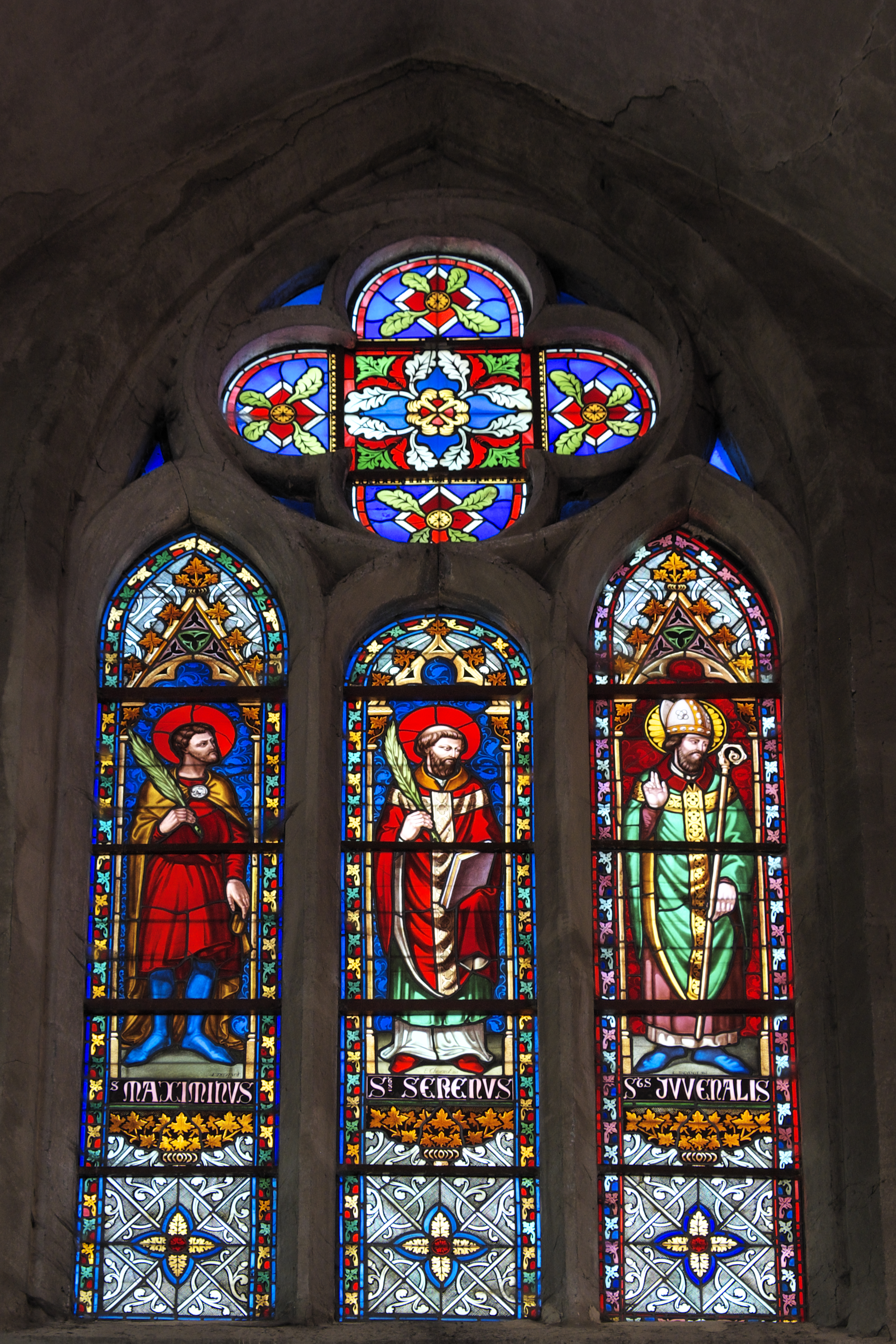 Katholische Pfarrkirche, ehemalige Stiftskirche, Saint-Cerneuf in Billom im Département Puy-de-Dôme (Auvergne-Rhône-Alpes), Bleiglasfenster